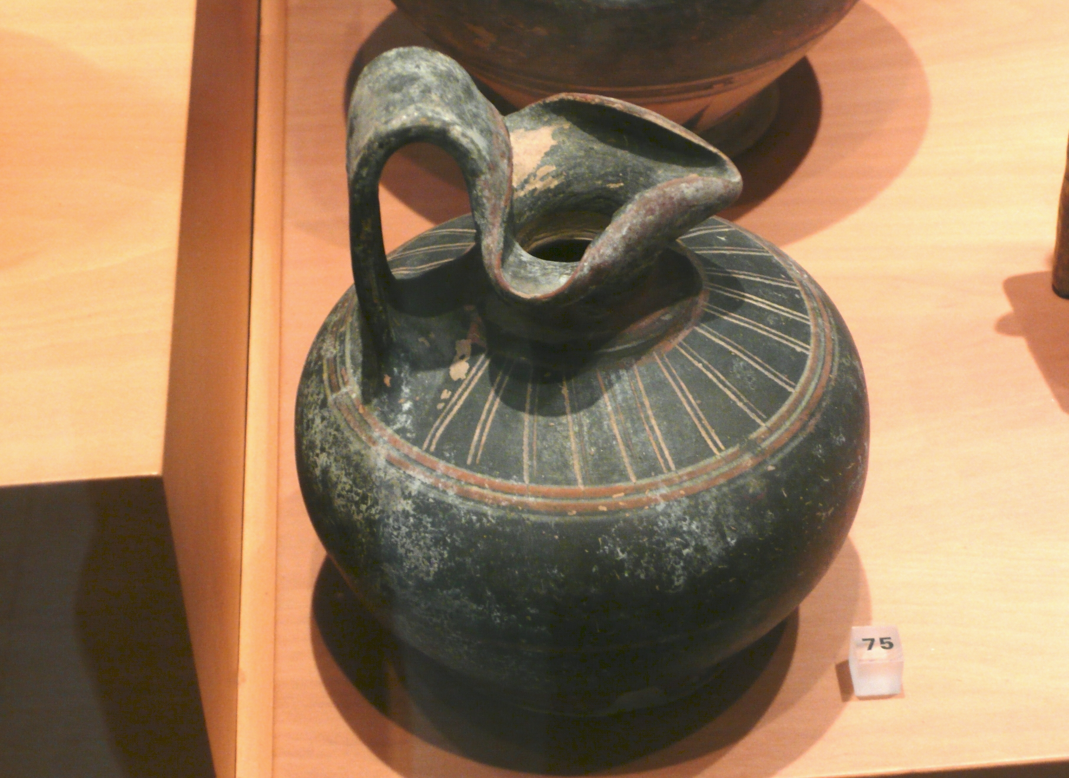 Oenochoé globulaire noir corinthien, 550-500 avant J.C., musée d'archéologie méditerranéenne de la vieille Charité à Marseille.